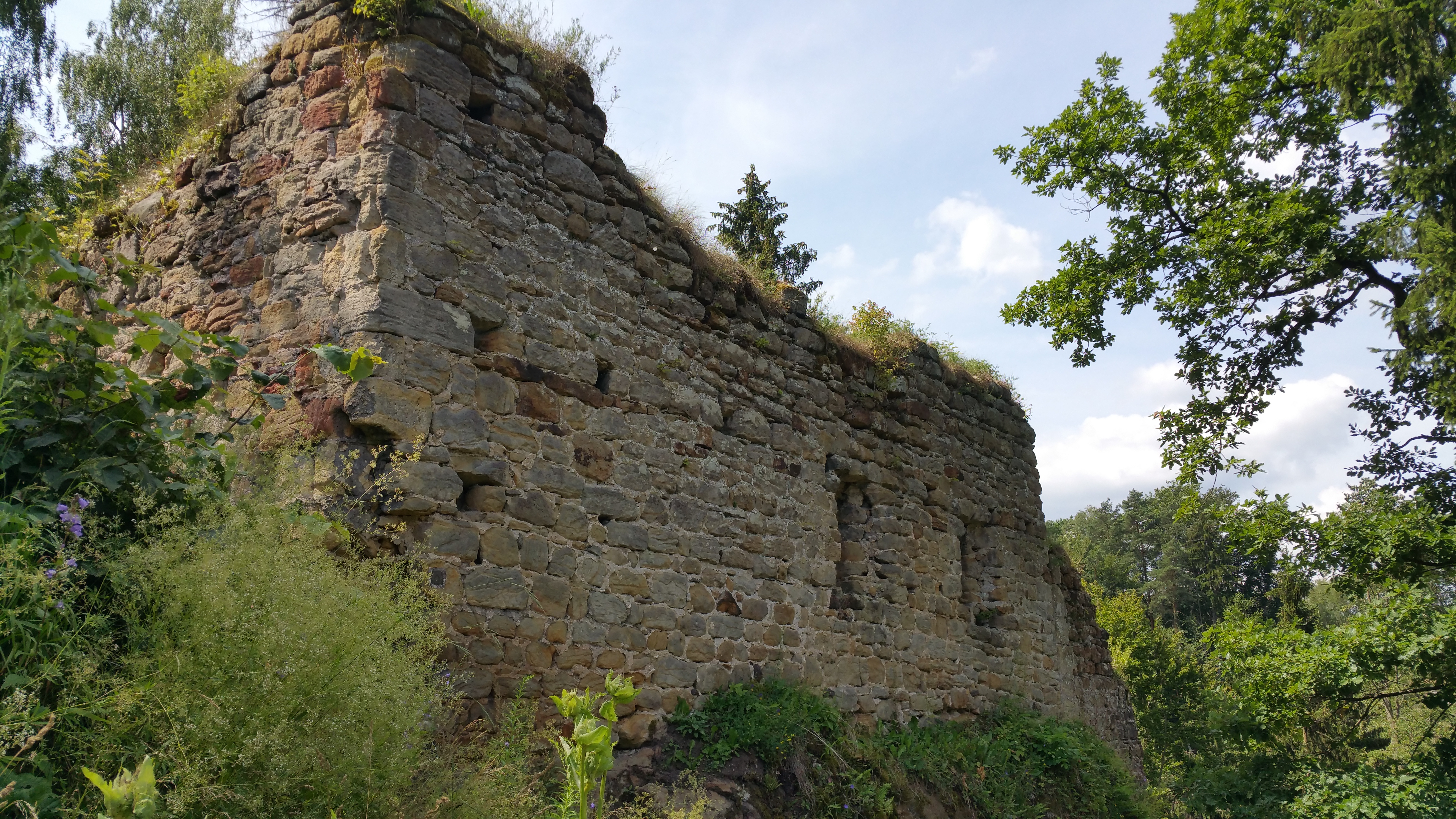 Severní stěna hlavního paláce Chudého hrádku.